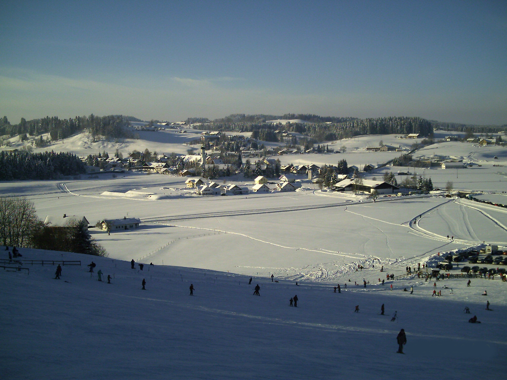 Blick auf Maierhöfen im Westallgäu